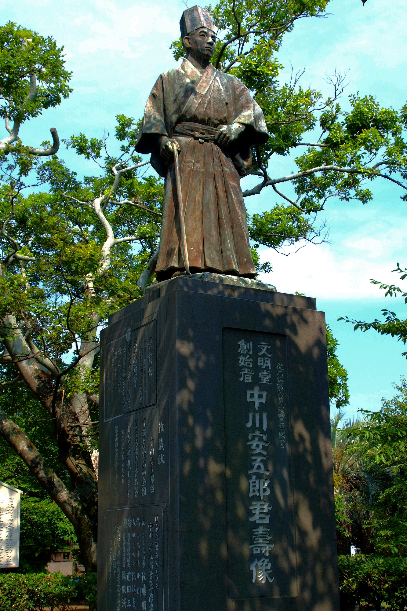 長崎県雲仙市国見町 文明堂創始者、中川安五郎の銅像